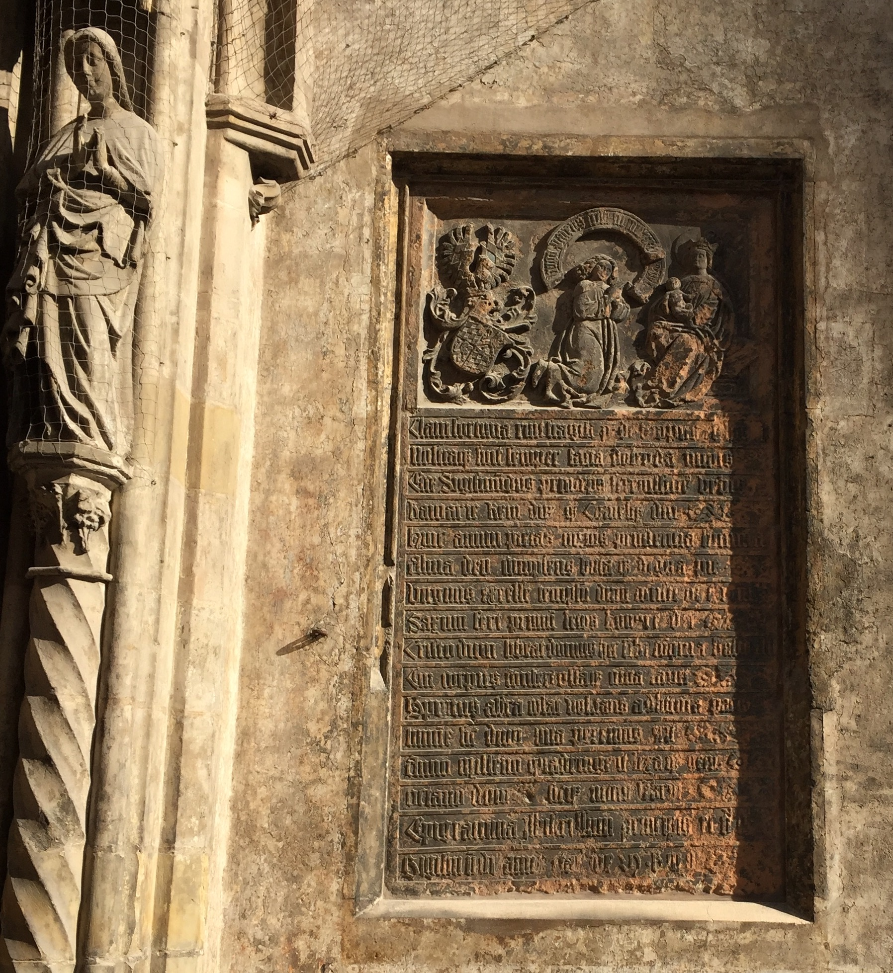 Der Grundstein der Frauenkirche, München